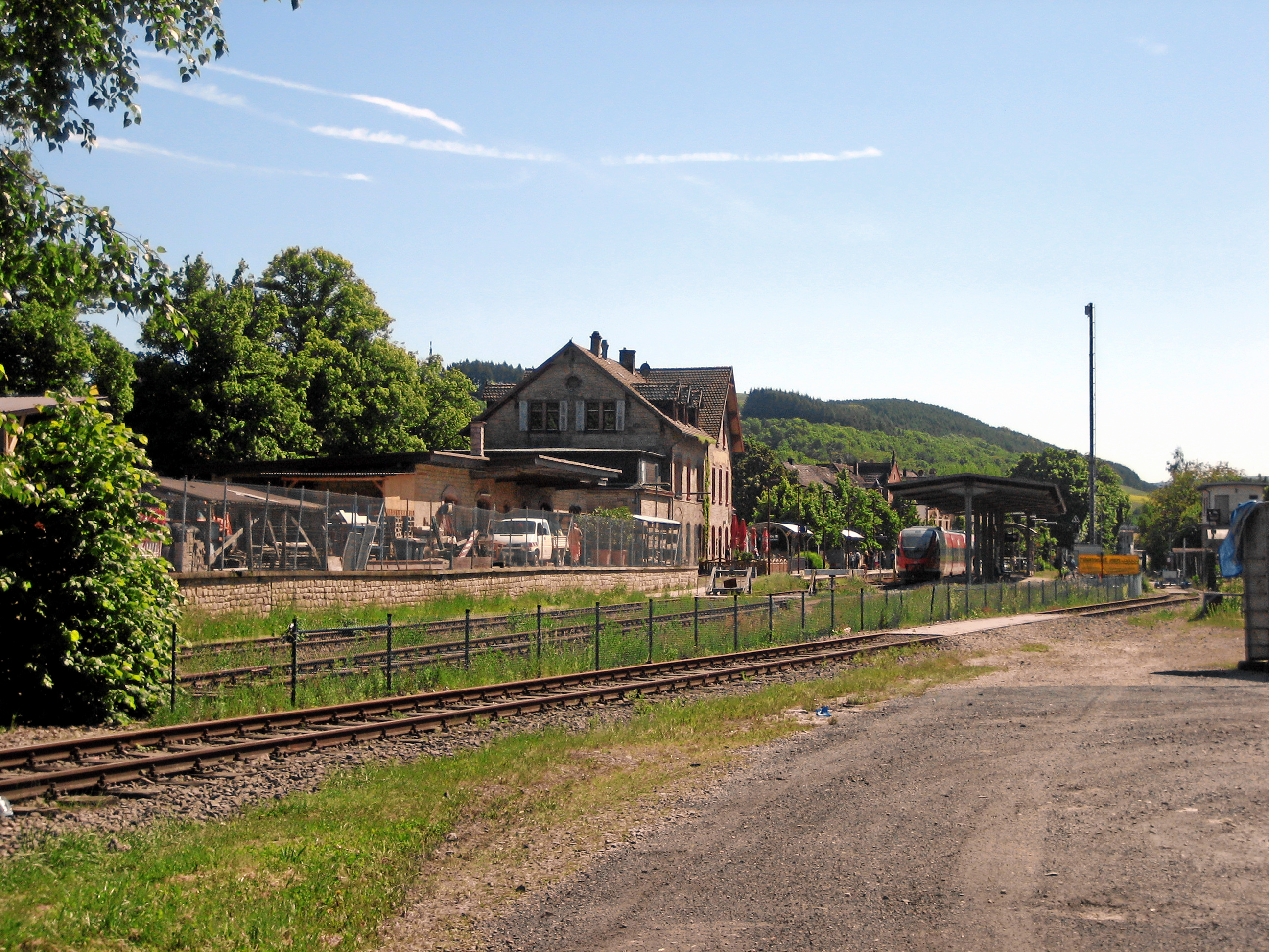 Bahnhof Lauterecken-Grumbach im Jahr 2013